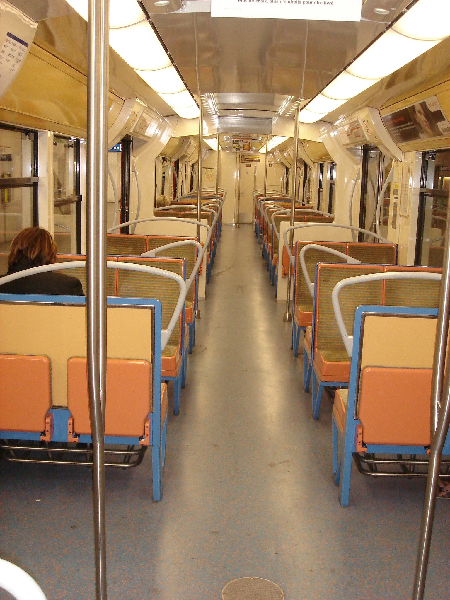 Interieur d'une rame de métro, RER, ligne A, Paris.